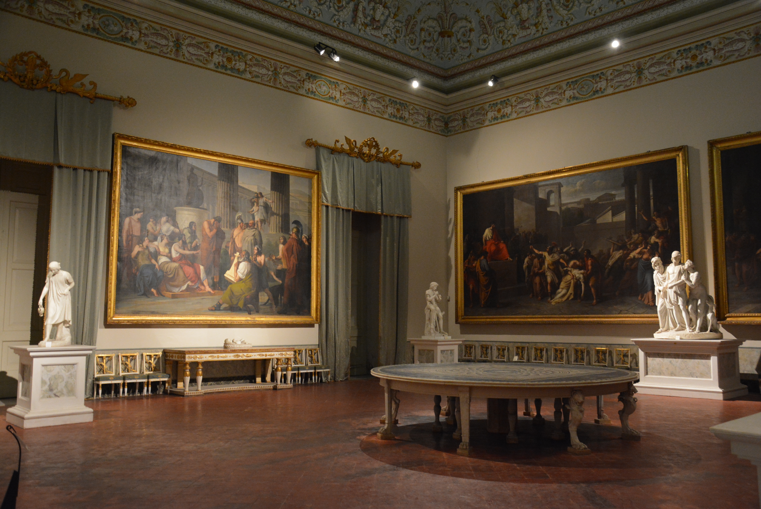 Salone Camuccini